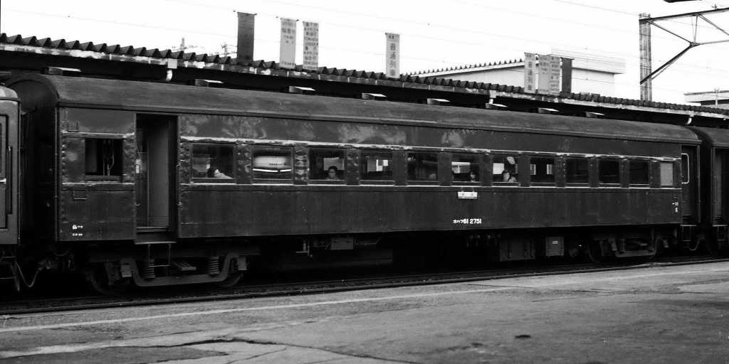 JNR Passenger car, at Aidu-Wakamatsu Sta. Banetsu-West Line, Fukushima Pref. 国鉄オハフ61 2751（仙ワカ）、磐越西線会津若松駅にて。